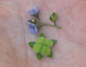 Cynoglossum creticum a Fornalutx, Mallorca.